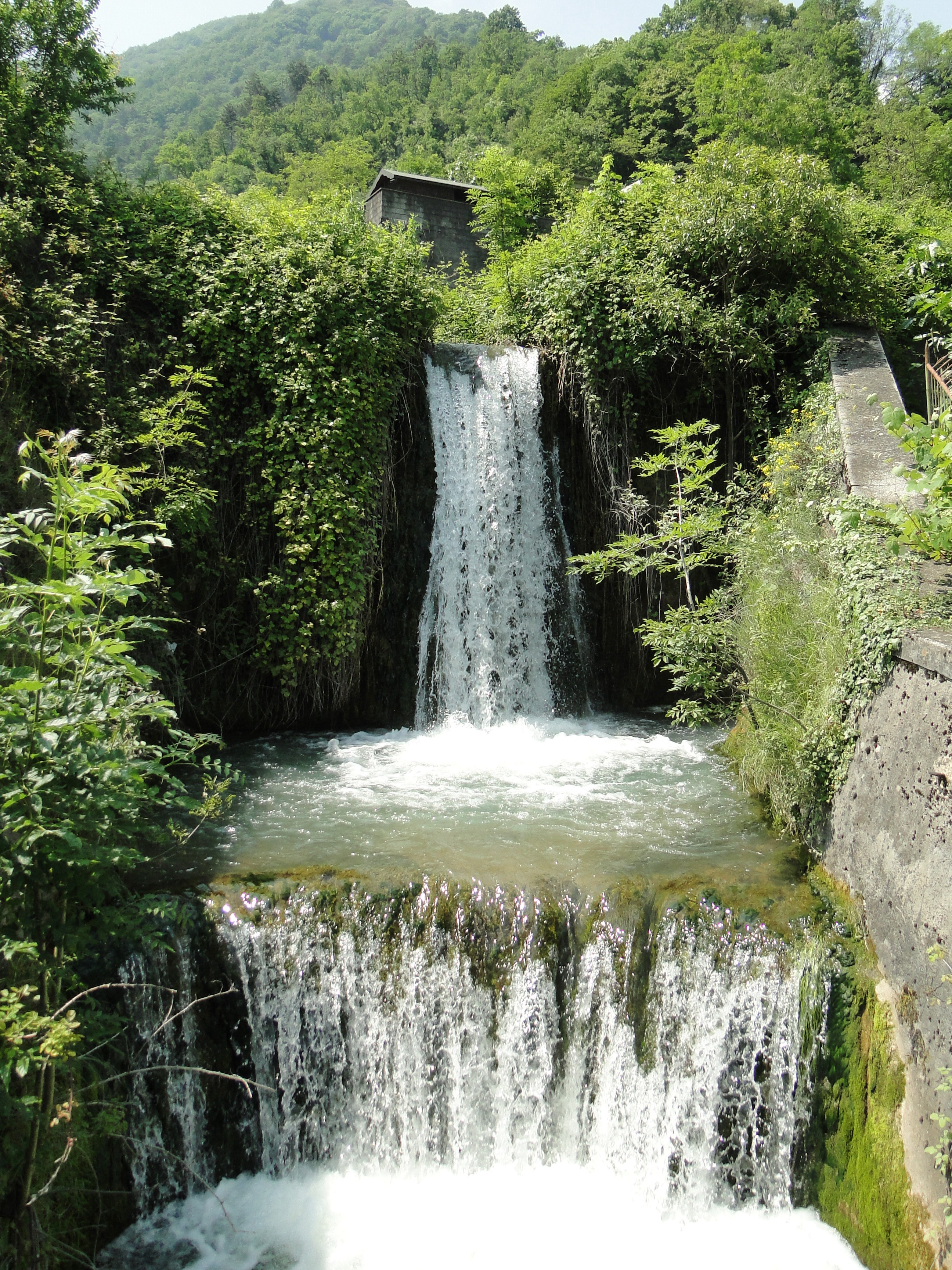 torrente Rovaro, tra Gazzaniga ed Albino (BG), Italia